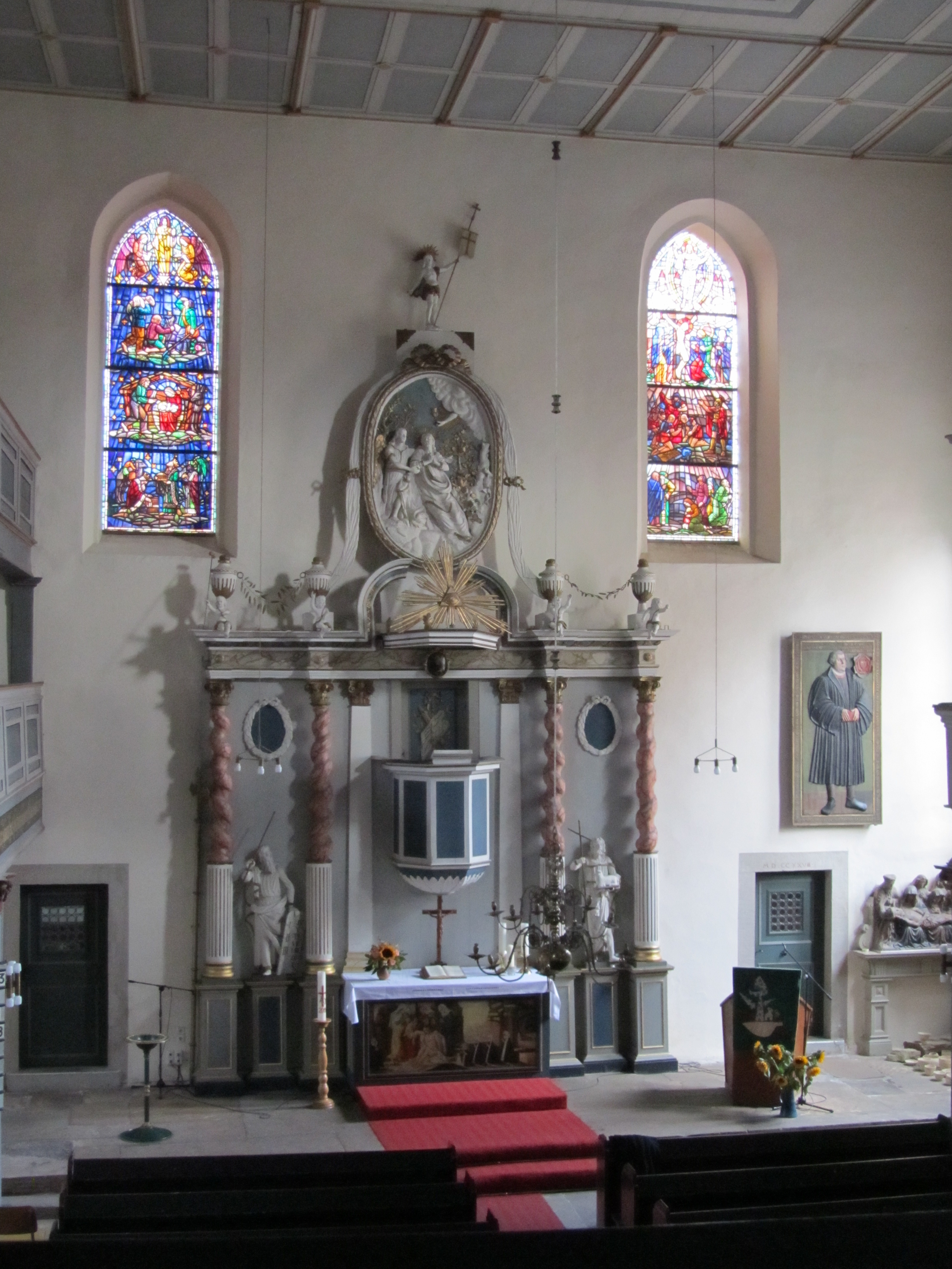 Der Innenraum der Andreaskirche in Erfurt.